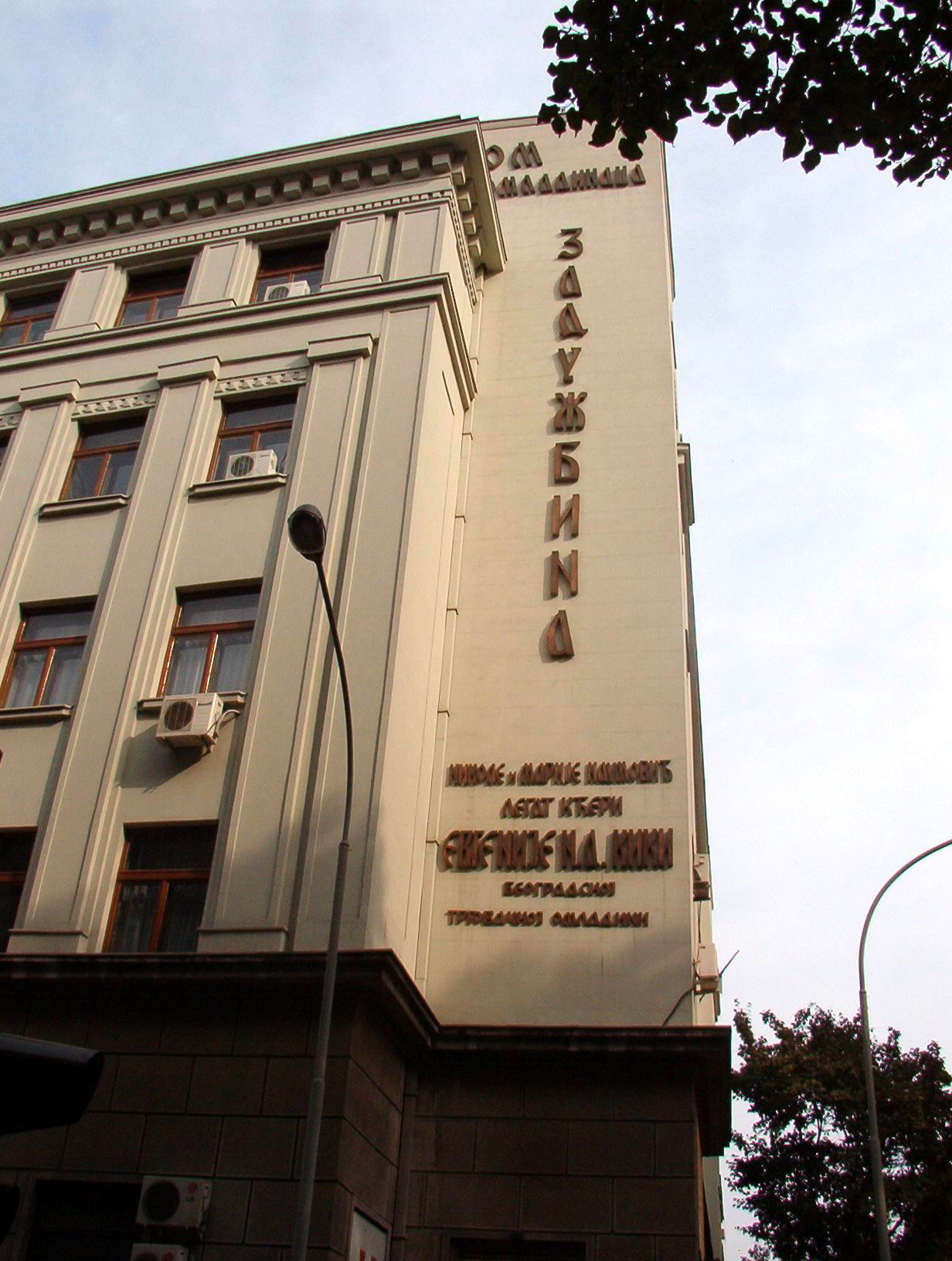 Задужбина Кики, улица Цетињска, Београд. Фотографисао Голдфингер